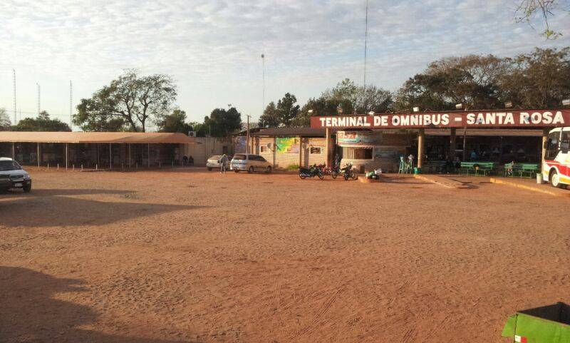 Terminal de Ómnibus de Santa Rosa del Aguaray